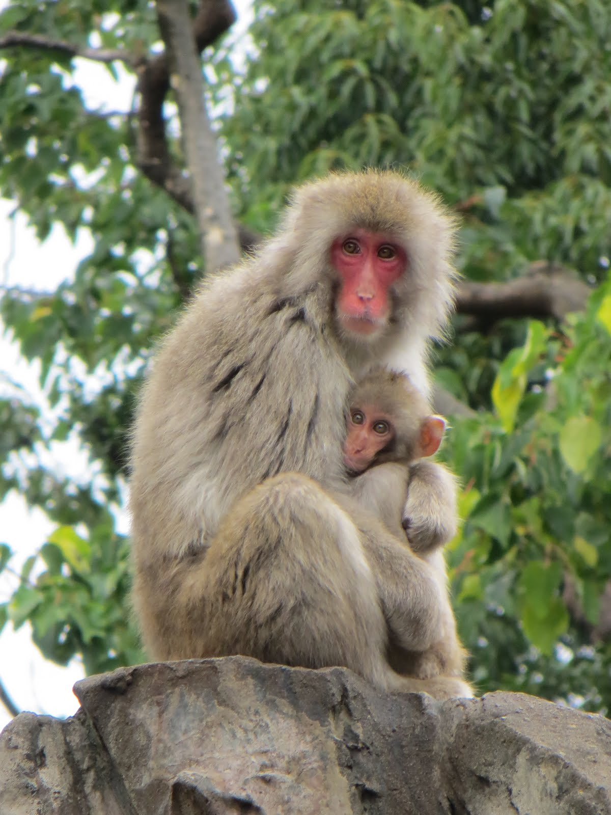 גן החיות, טוקיו, יפן